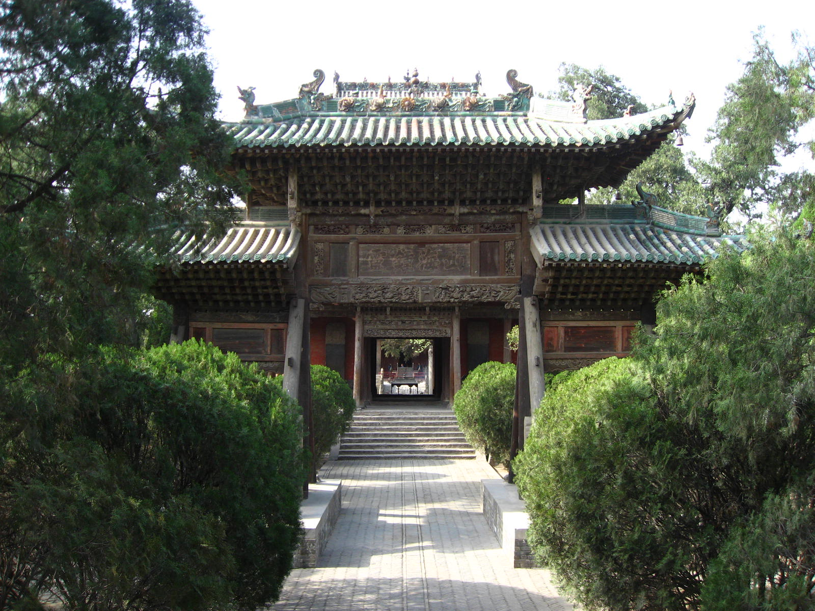 山西運城解州關帝廟，山海鐘靈坊